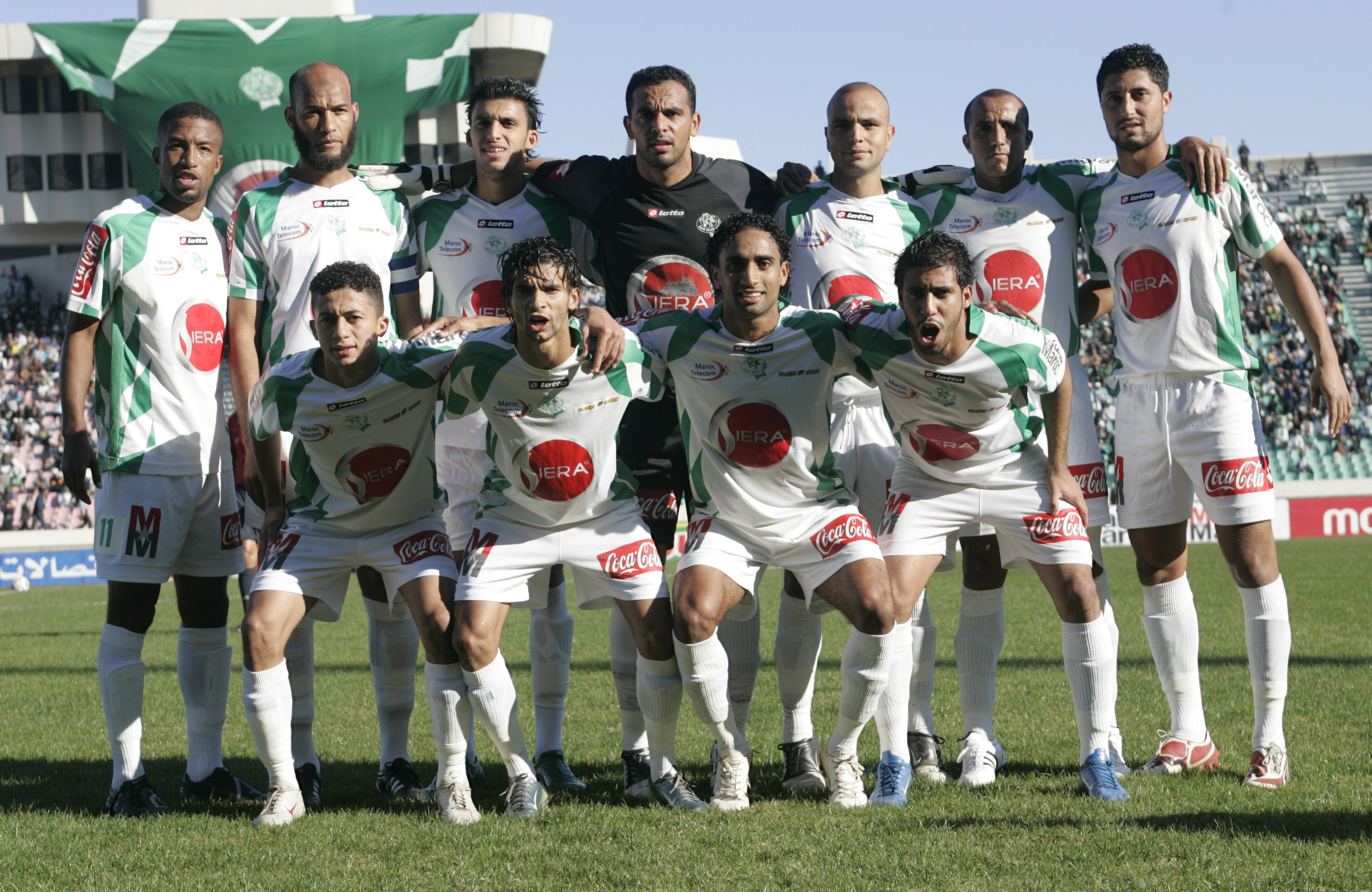 Equipe du Raja de la saison 2008-2009